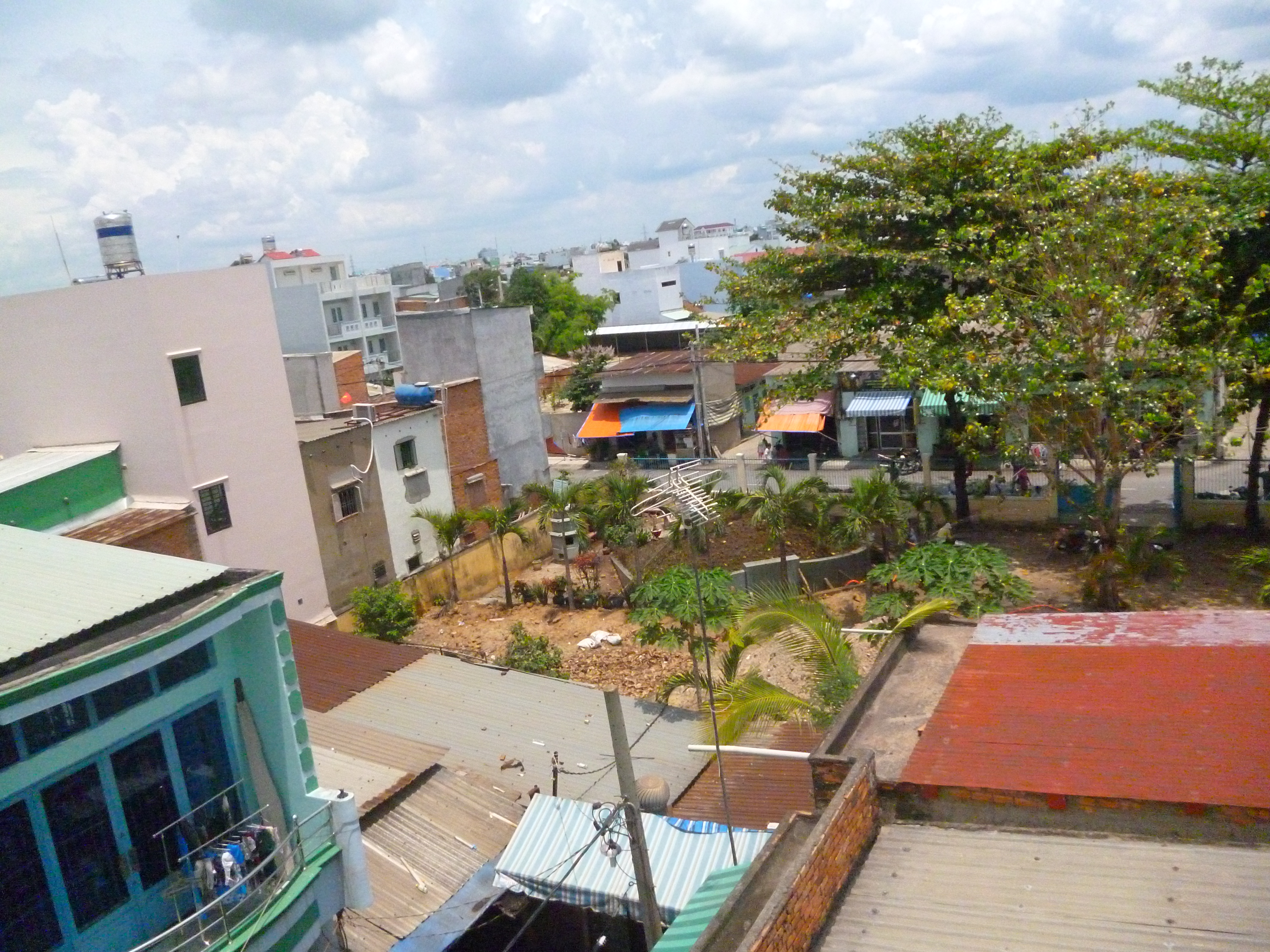 Hình chụp phường Bình Hưng Hòa A, quận Bình Tân (chụp tại Khu phố 21). Chụp bằng máy ảnh cá nhân